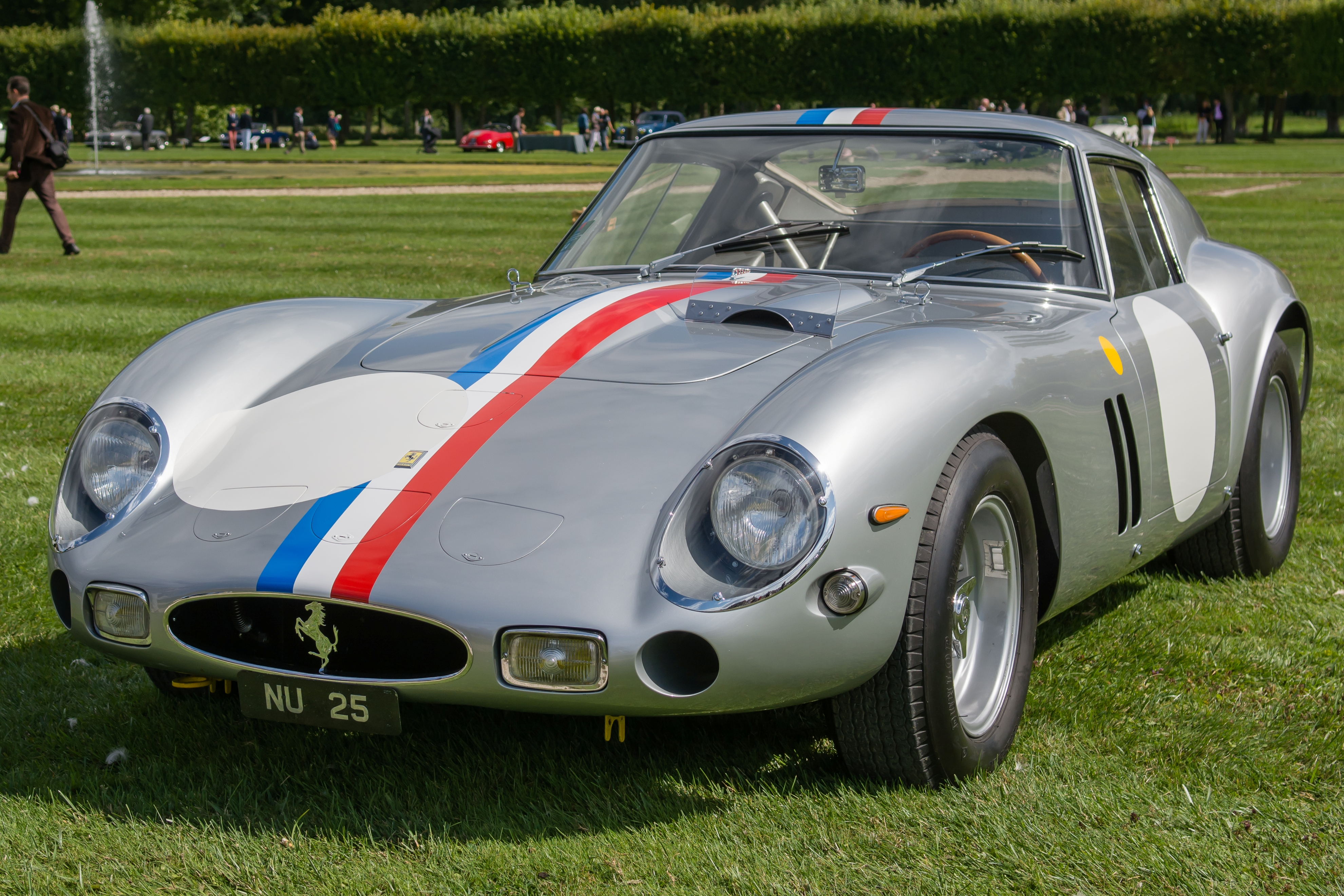 Chantilly Arts & Elegance Richard Mille 2015